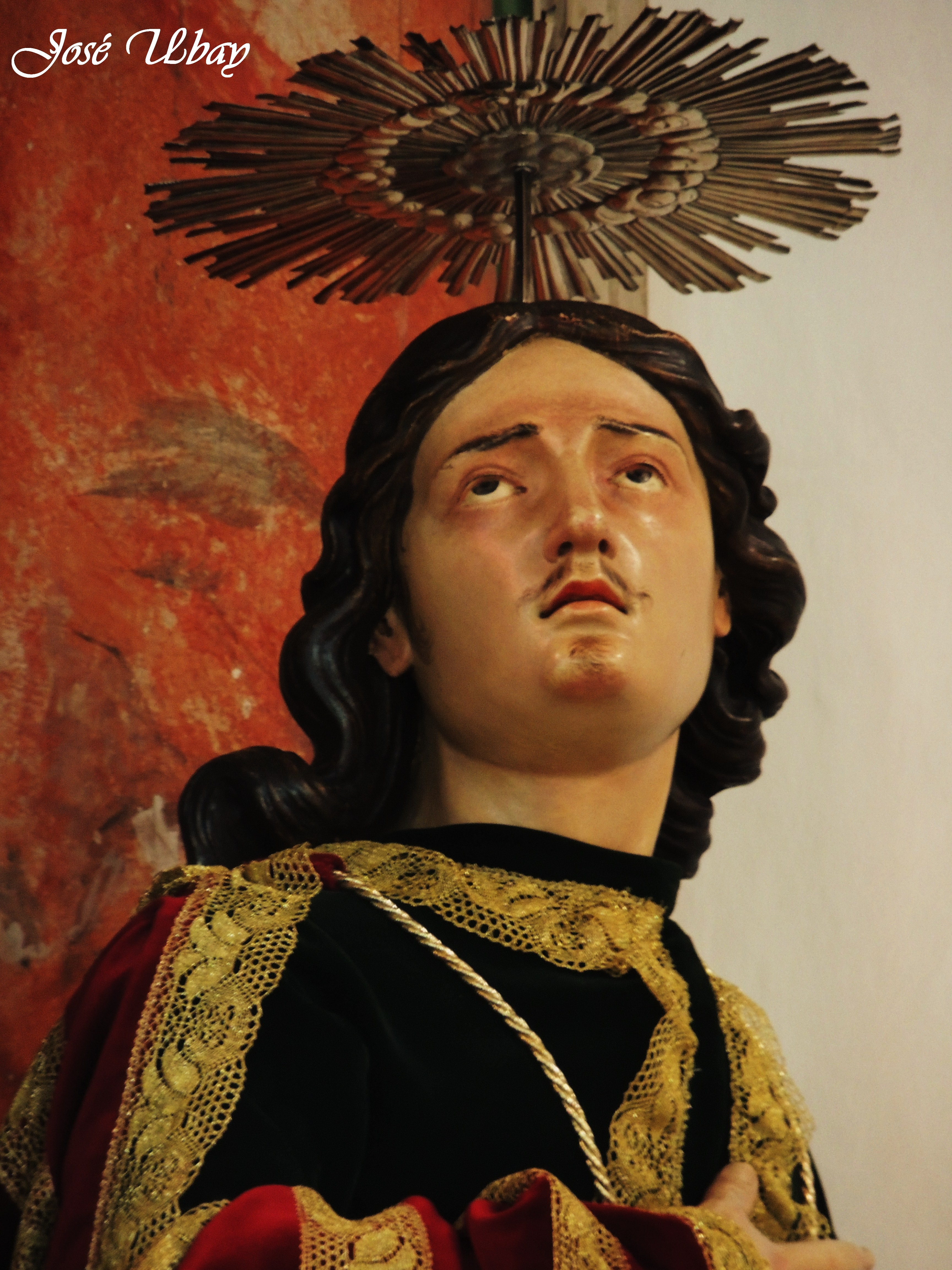 San Juan Evangelista. Siglo XVIII. José Luján Pérez. Basílica de san Juan Bautista (Telde).